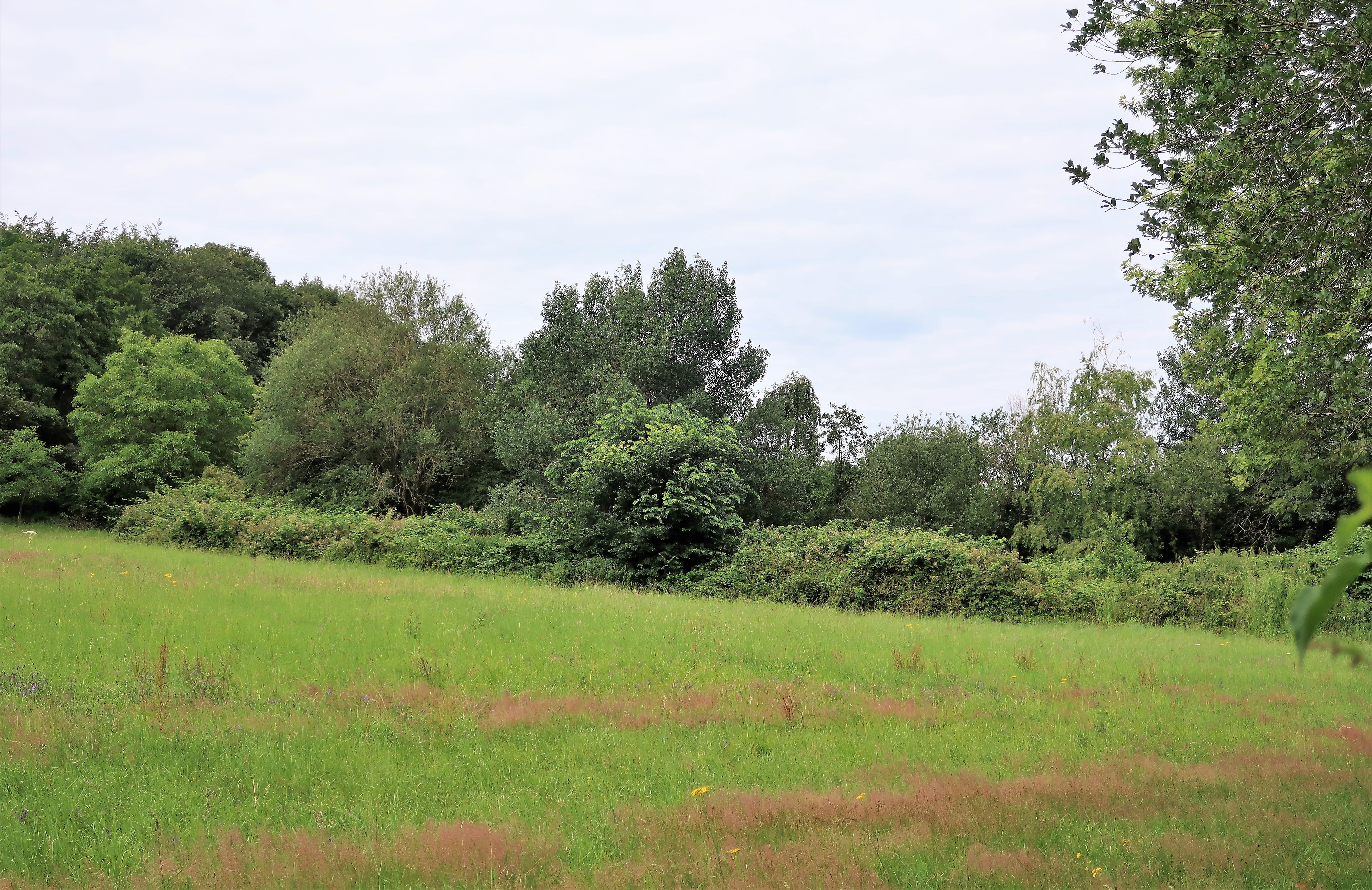 Geschützter Lanndschaftsbestandteil 1.4.2.20 „Hecke in der Kleingartenanlage Am Ruhhof“ in Hagen-Vorhalle. Es handelt sich um eine ca. 200 m lange Hecke in der Kleingartenanlage westlich von Funckenhausen.